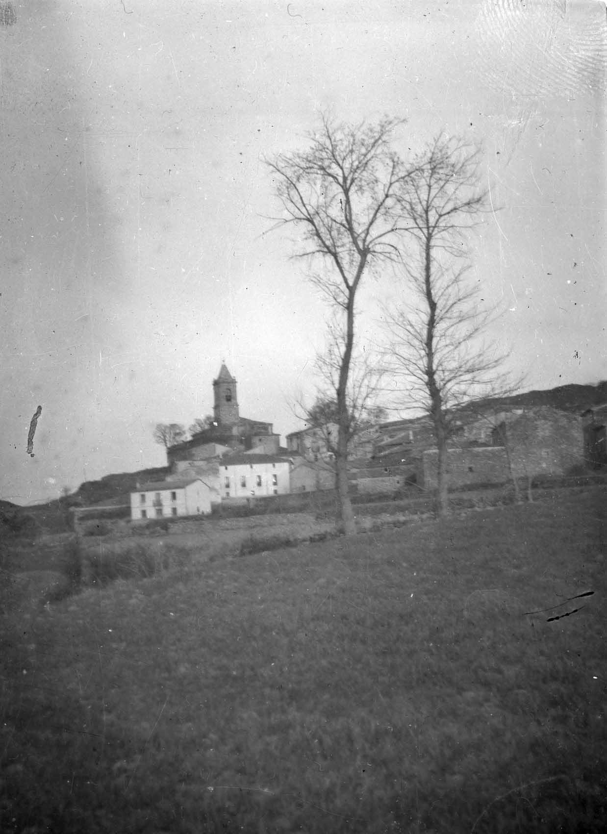 Indalecio Ojanguren mendizale eta argazkizale eibartarrak Etaion harturiko argazkia.